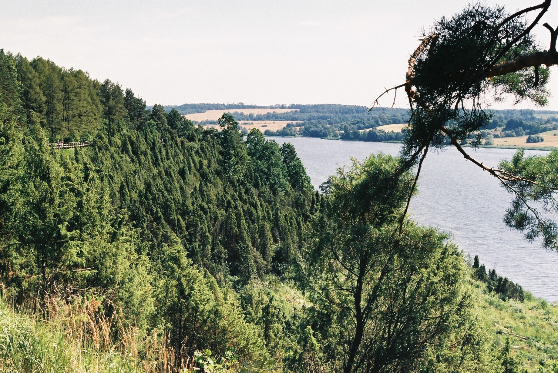 Kadagių slėnis Kauno rajone